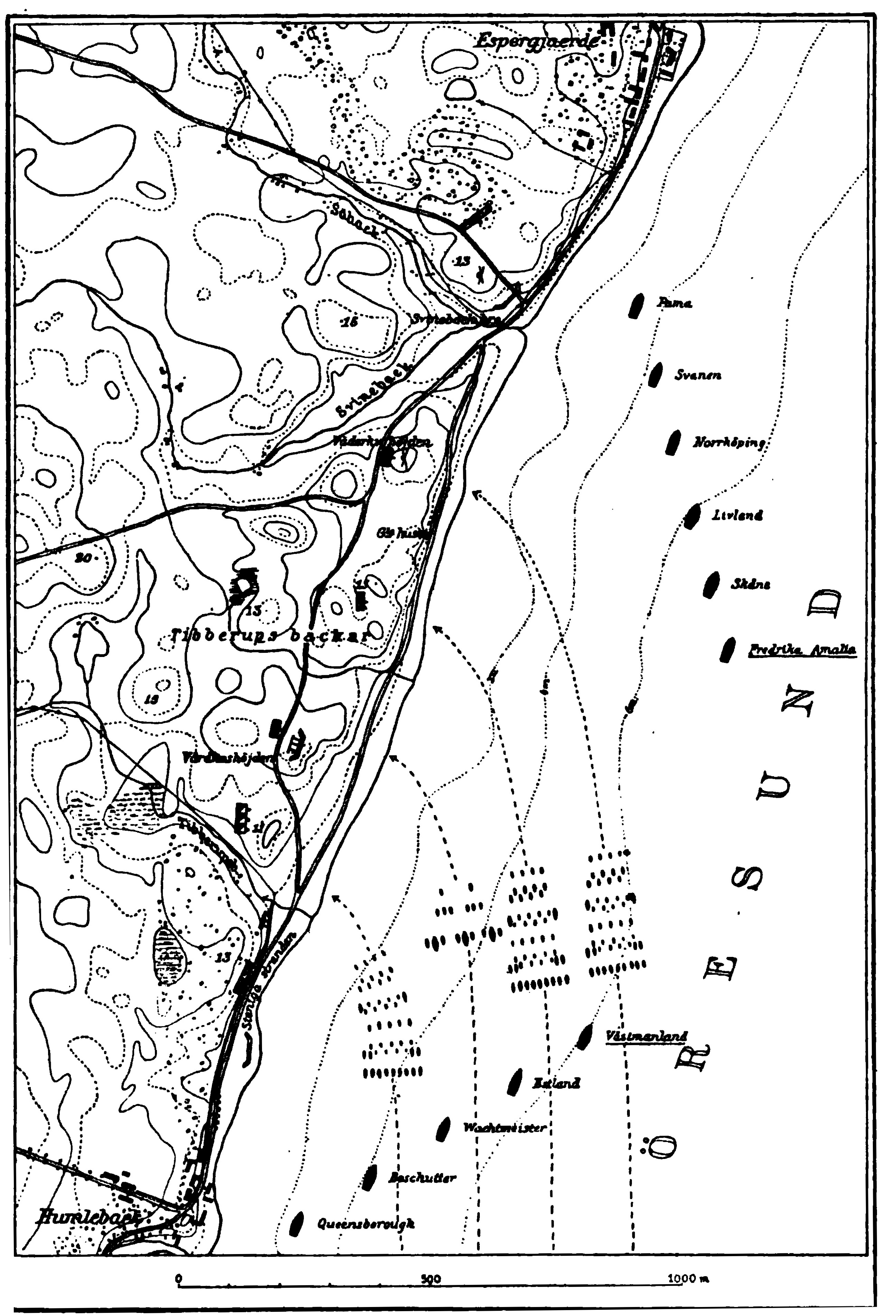 Landstigningen vid Humlebäck 1700